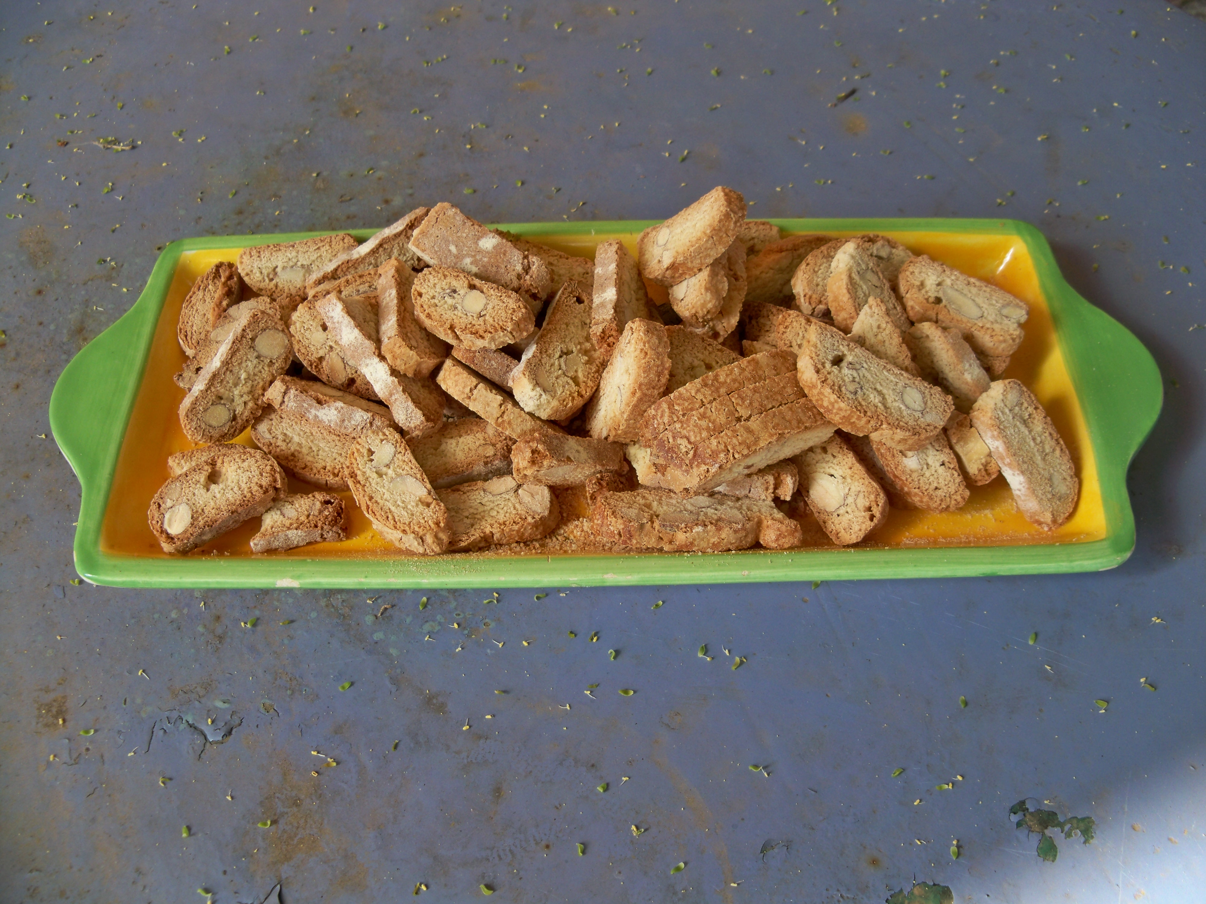 Petits gateaux les croquants de Vinsobres, dans la Drôme provençale